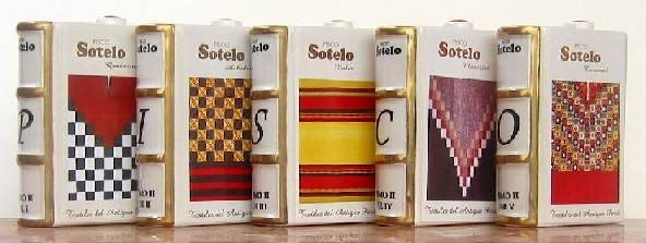 Miniaturas de Pisco - Producto Peruano